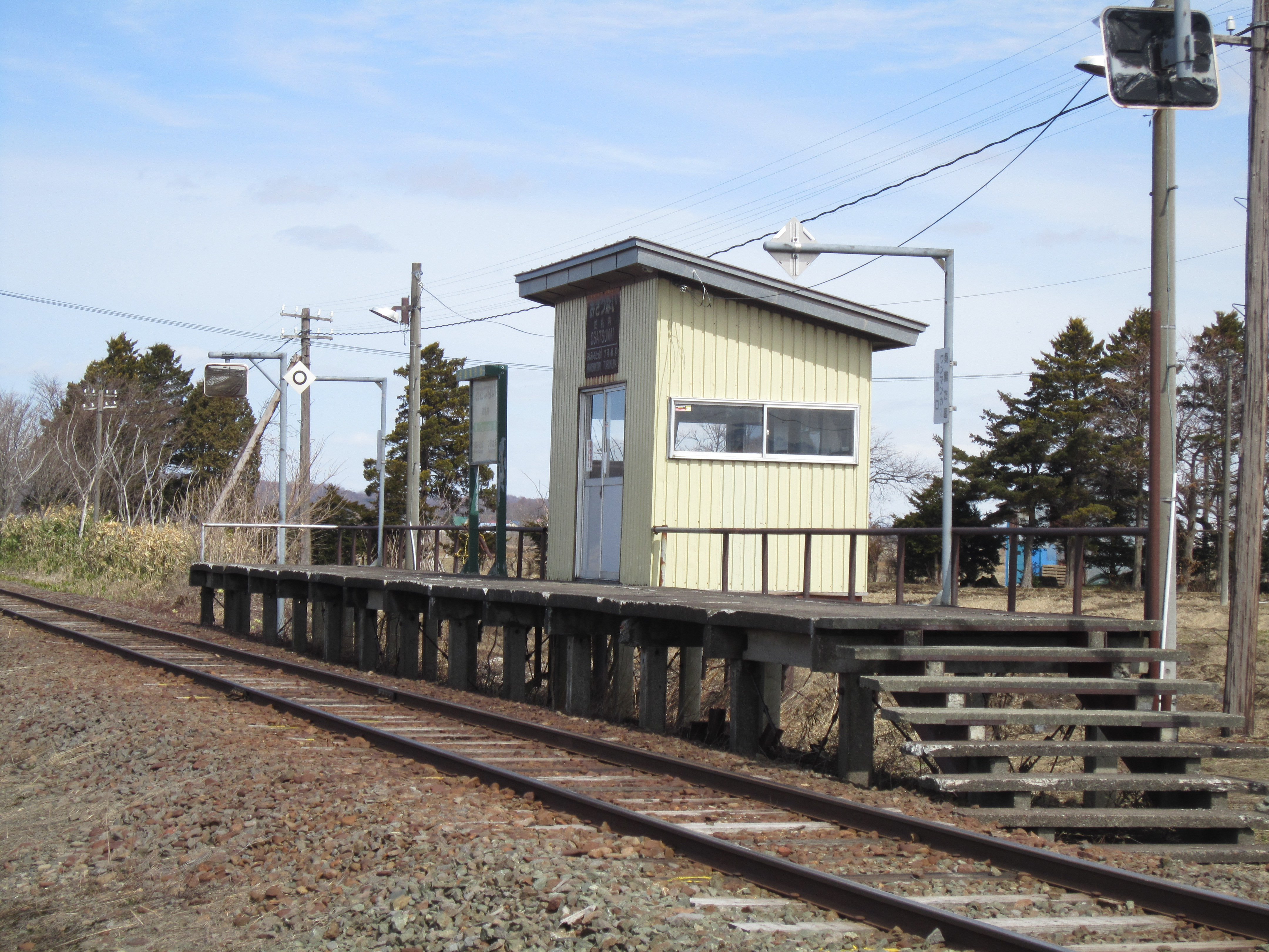 於札内駅。浦臼町